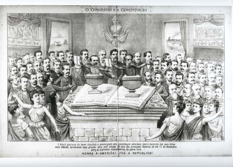 Alegoria alusiva à primeira eleição presidencial do Brasil (em 1891), na qual o Congresso Constituinte elegeu os Marechais Deodoro da Fonseca e Floriano Peixoto como, respectivamente, o presidente e o vice-presidente do Brasil. Autoria do desenhista Pereira Neto.